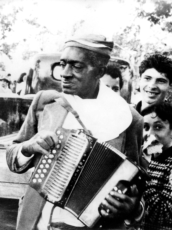 Acordeonista uruguay Aquilino Pío, tocando el acordeón de dos hileras. Fotografía tomada en Salto el 15 de abril de 1965 y se trata de un positivo de gelatina y plata sobre papel. Digitalización y tratamiento digital: Centro de Fotografía de Montevideo.